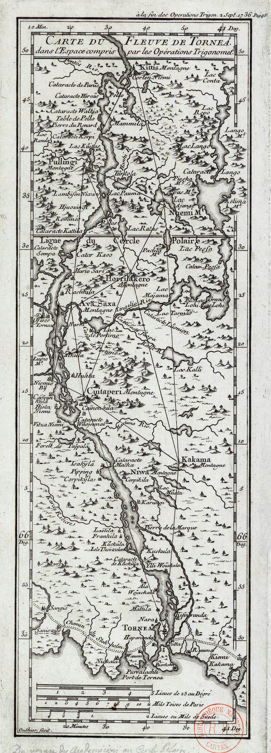 Carte du fleuve de Tornea, avec la triangulation de Maupertuis, 1736-1737.